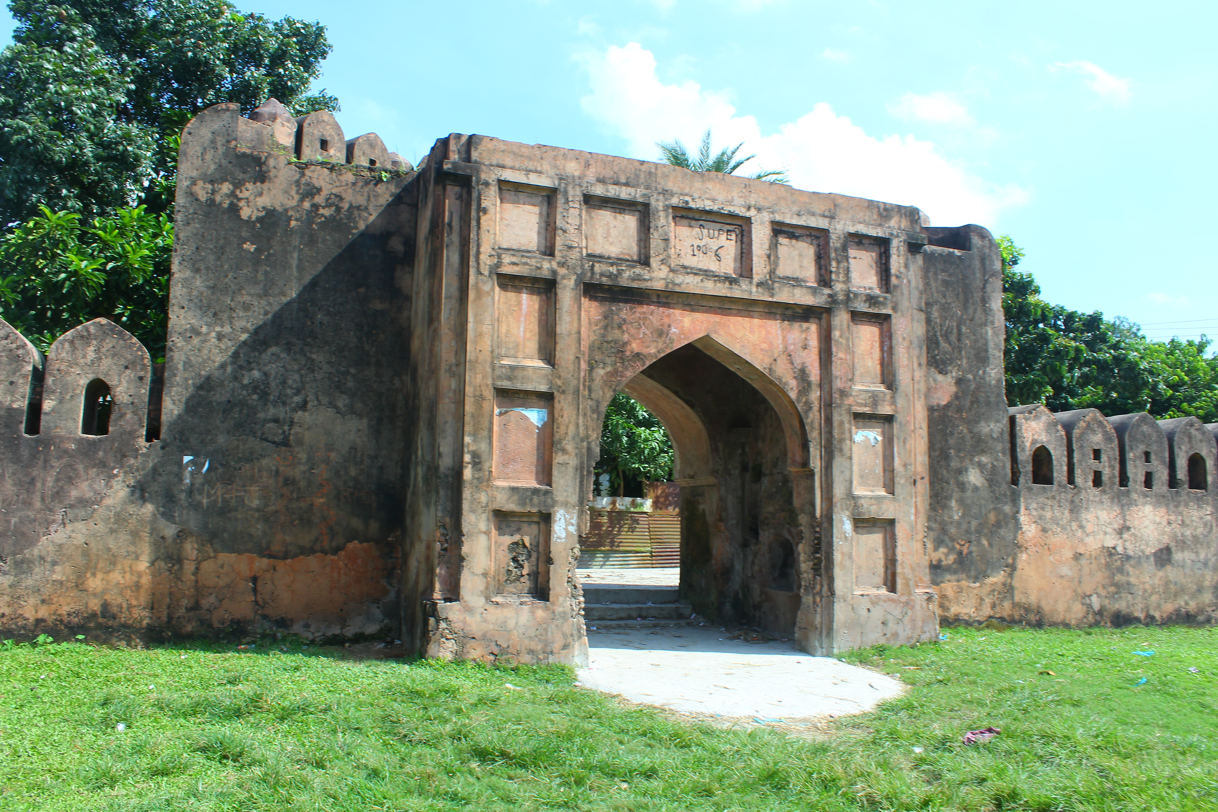 সোনাকান্দা দুর্গ